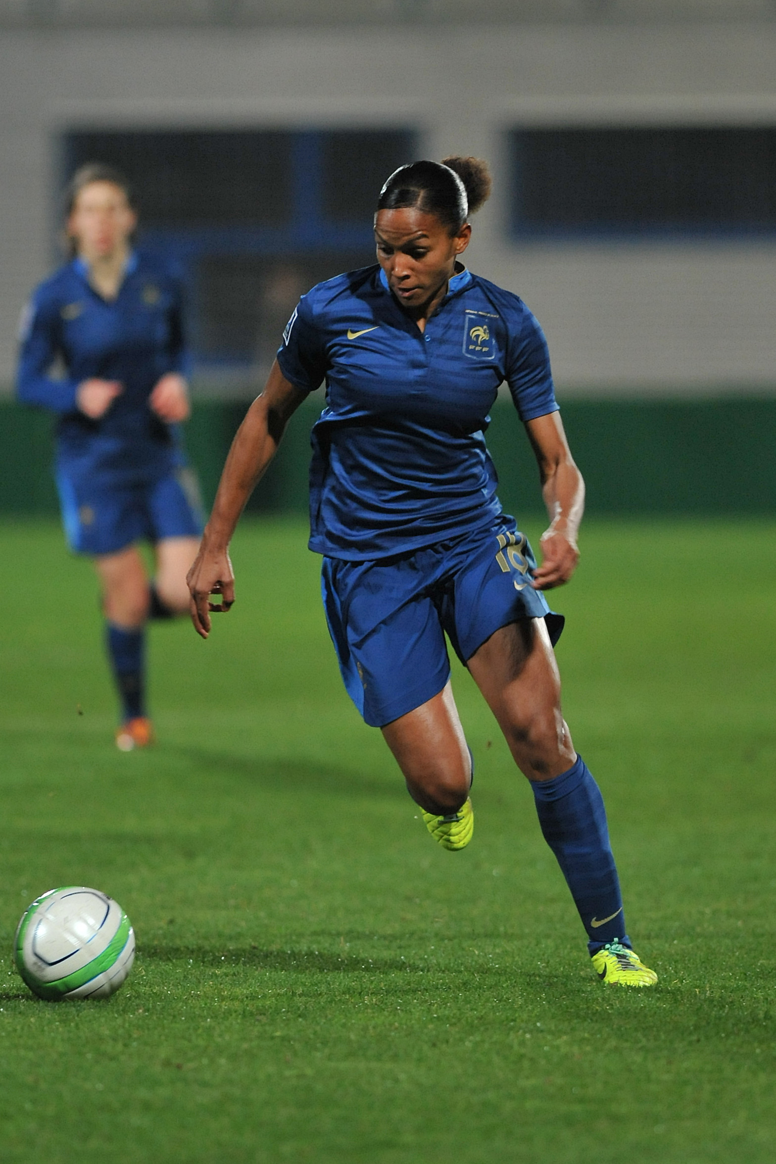 FIFA Women's World Cup 2015 Qualiying Round Österreich - Frankreich am 31. Oktober 2013 in Ritzing: Marie Laure Delie